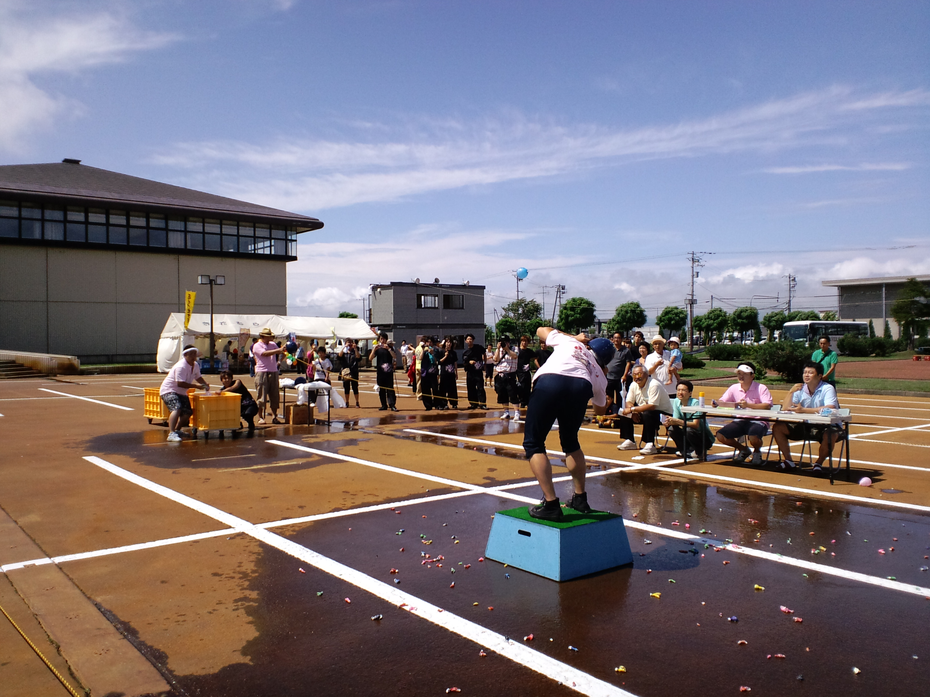 きたむら田舎フェスティバル・わ～るぞカップ